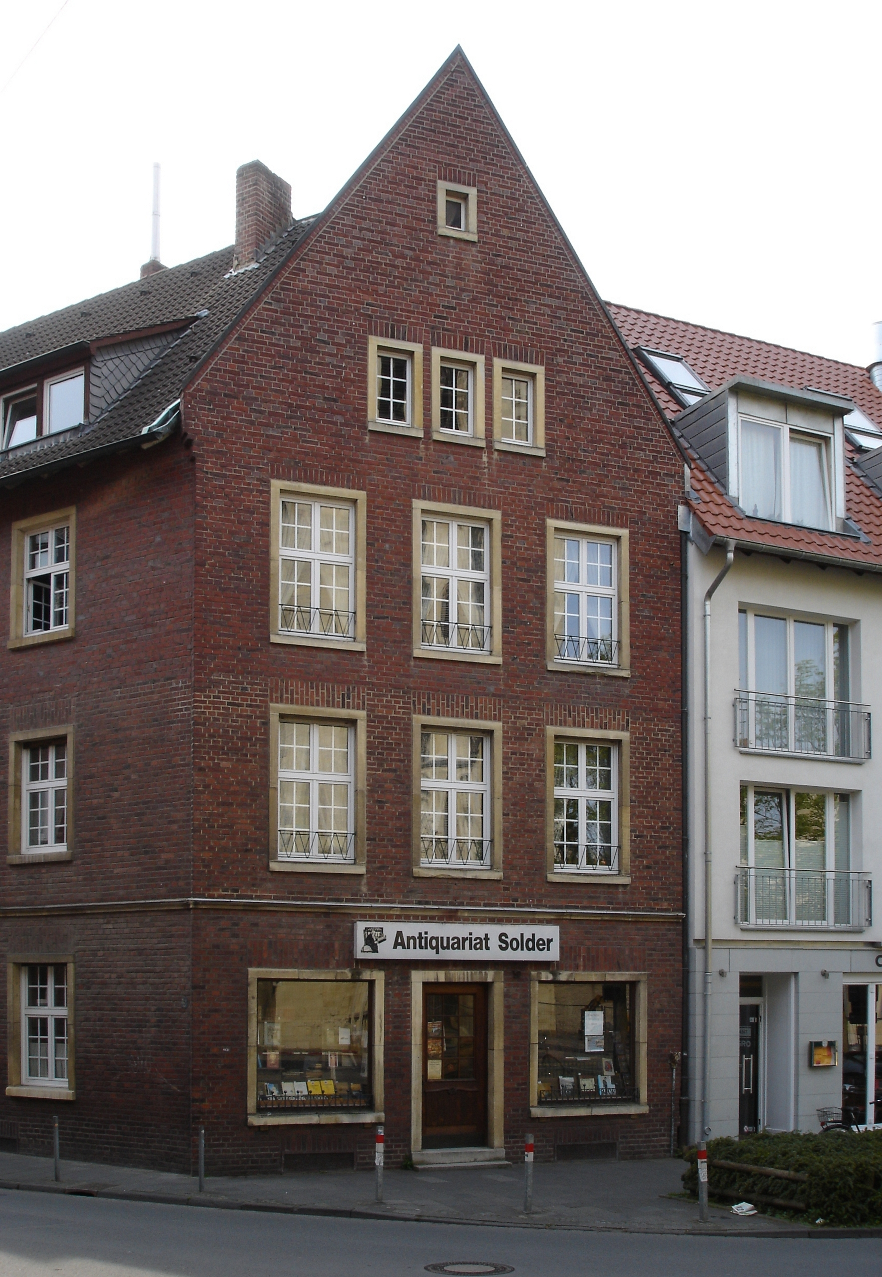 Das Antiquariat Solder bzw. Wilsberg in der Krimiserie "Wilsberg" in Münster, Westfalen, Deutschland